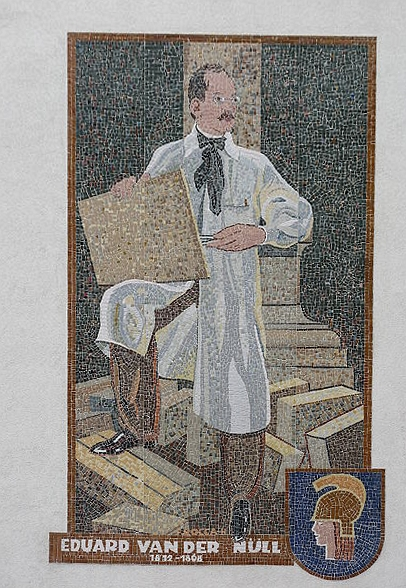 Mosaik Eduard van der Nüll von Fritz Rocca-Humpoletz (F.ROCCA-H), Davidgasse 35, Wien-Favoriten